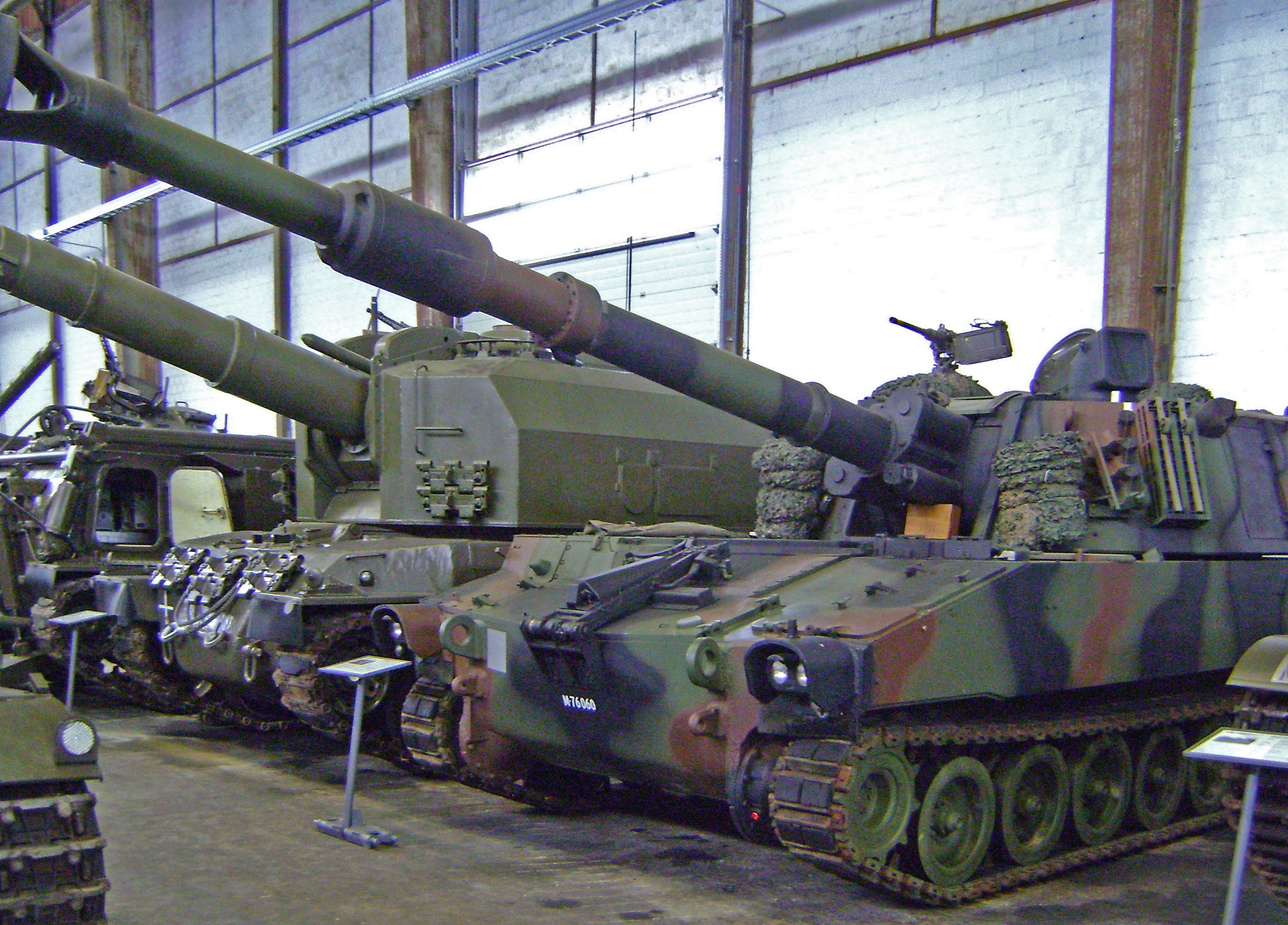 Pz Kanone 68 und M109